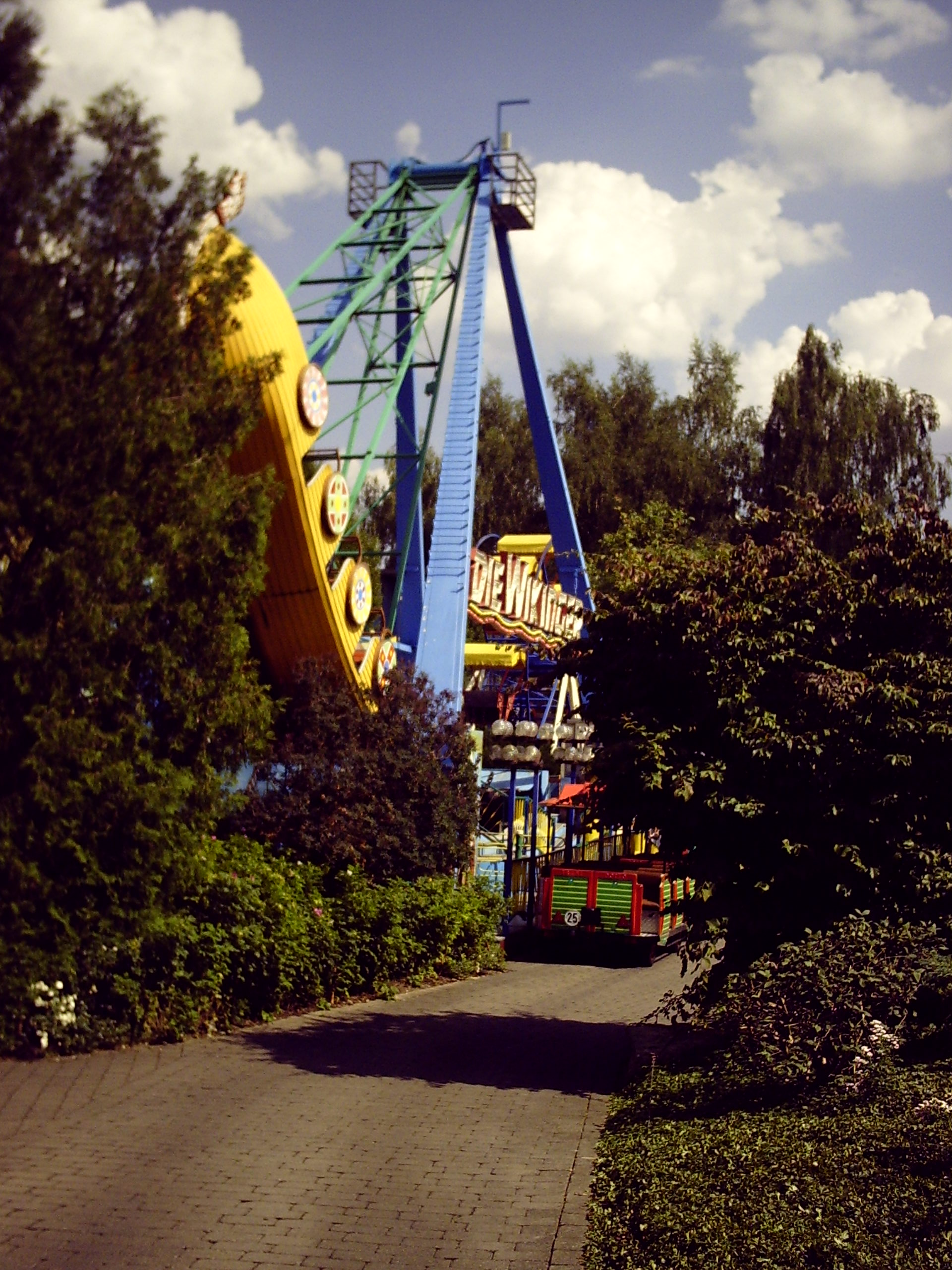 Schiffschaukel "Wikingerboot" im Schwabenpark